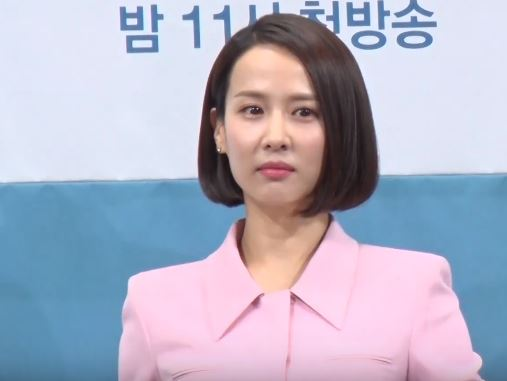 JTBC 새 금토드라마 '아름다운 세상' 제작발표회가 4일 서울 강남구에 위치한 임피리얼팰리스 호텔에서 열렸다.